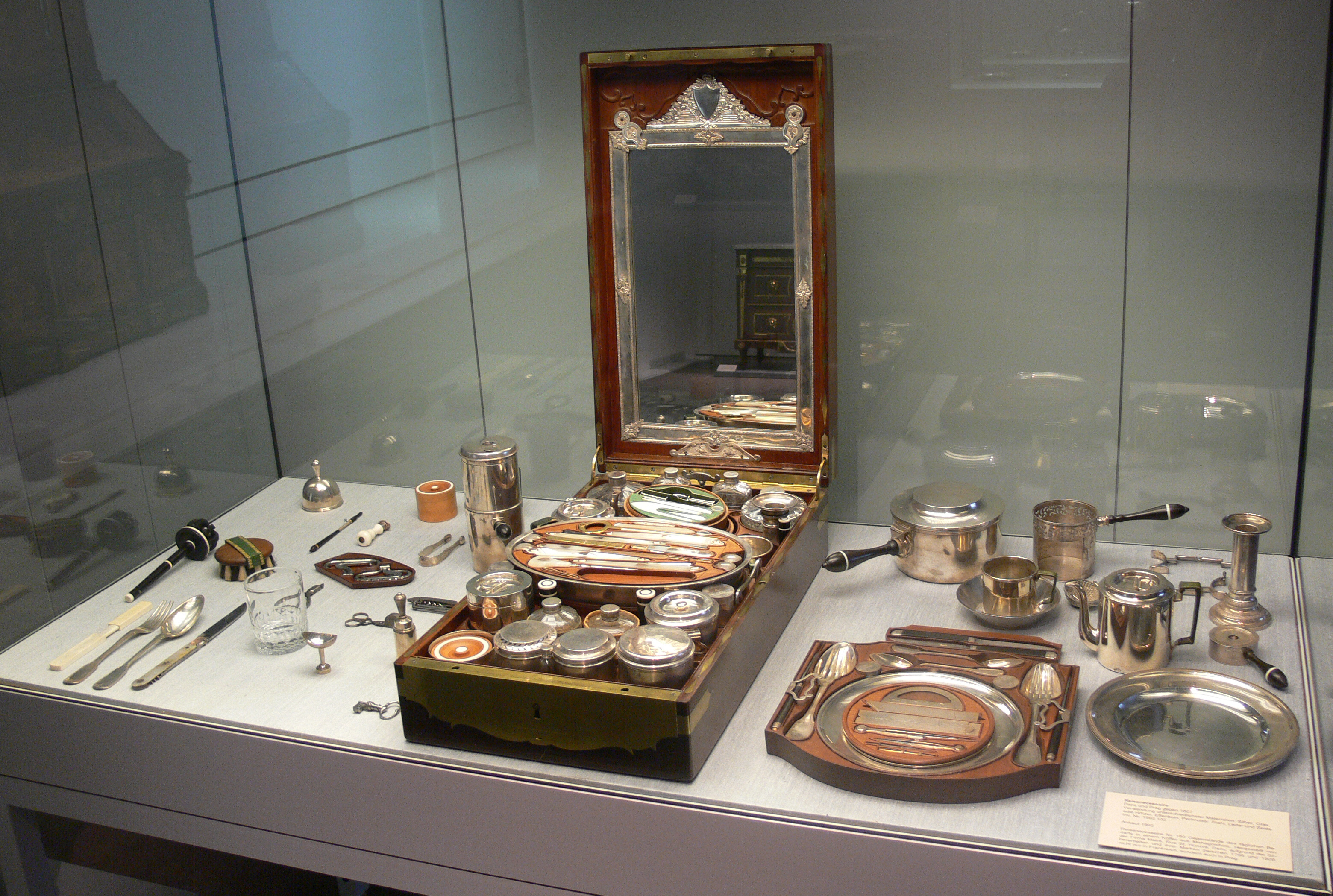 Reisenecessaire für 180 Gegenstände des täglichen Bedarfs, in einem Koffer aus Mahagoniholz. Hersteller: Firma Maire, rue Saint-Honoré, Paris, gegen 1807 (Silberwaren: Paris und Prag, 1798-1809) Kunstgewerbemuseum Berlin, Inv. Nr. 1992,100